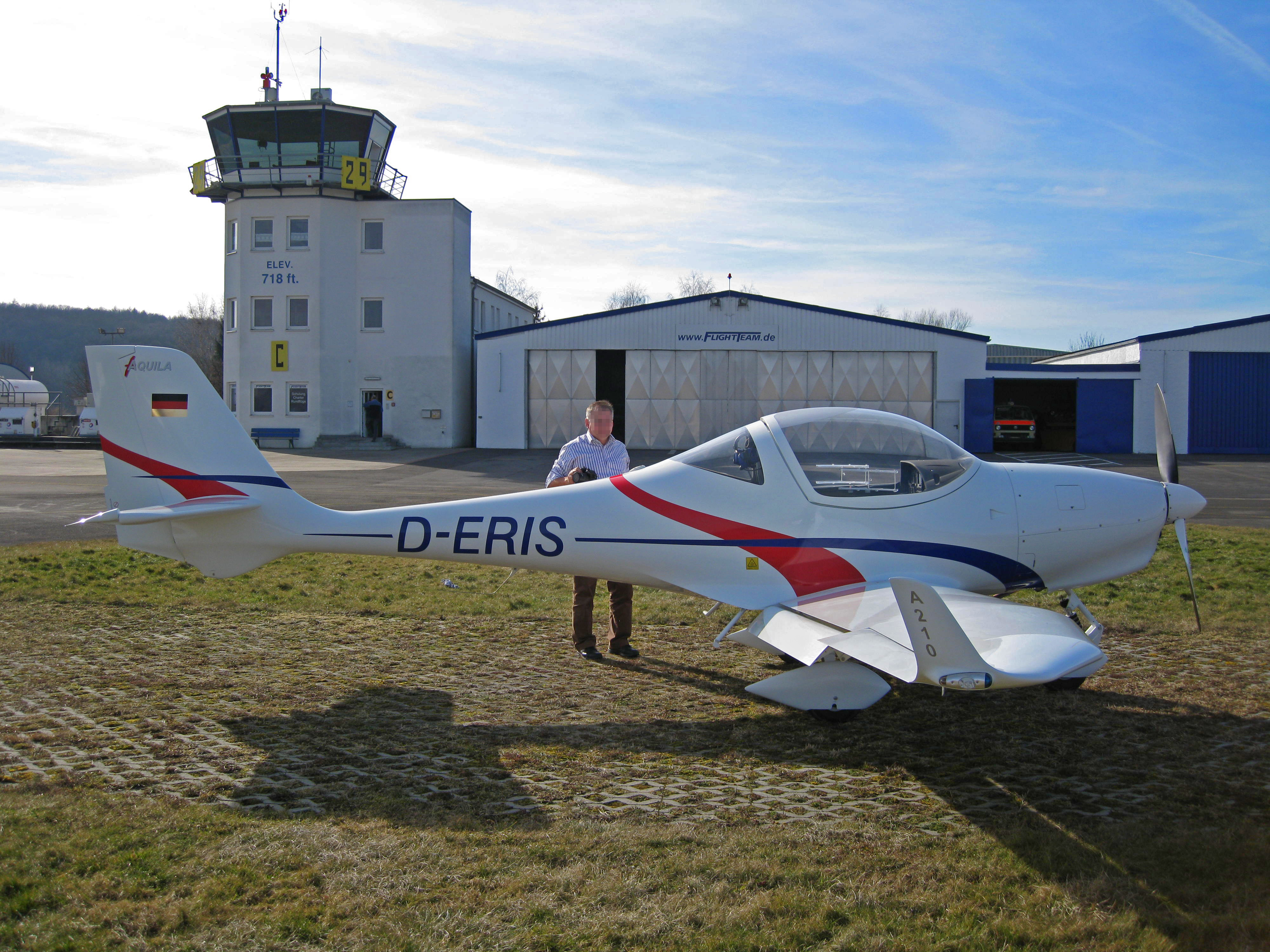 Flugplatz Haßfurt-Schweinfurt